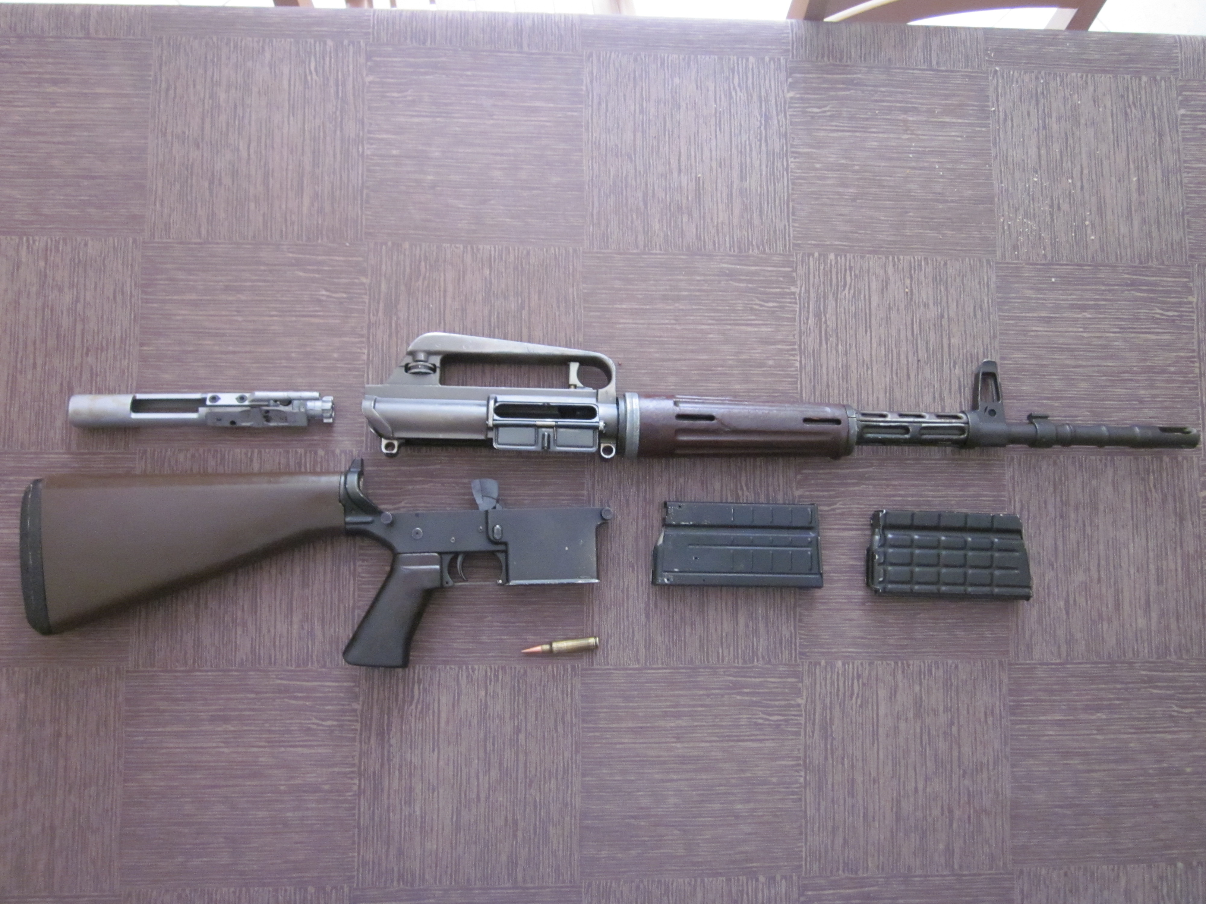 photo AR10